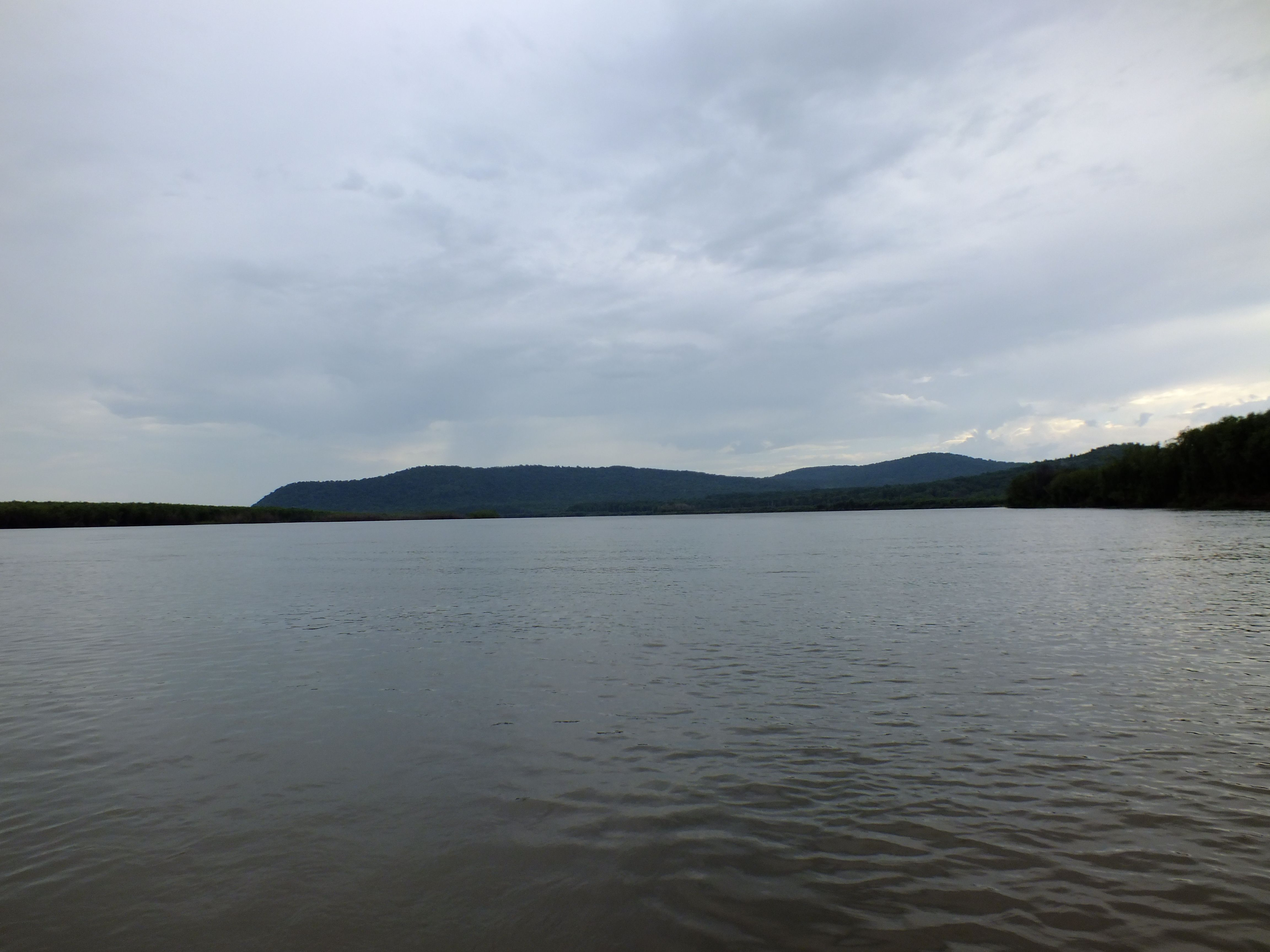 Протока Серебряная у села Ачан Хабаровский край